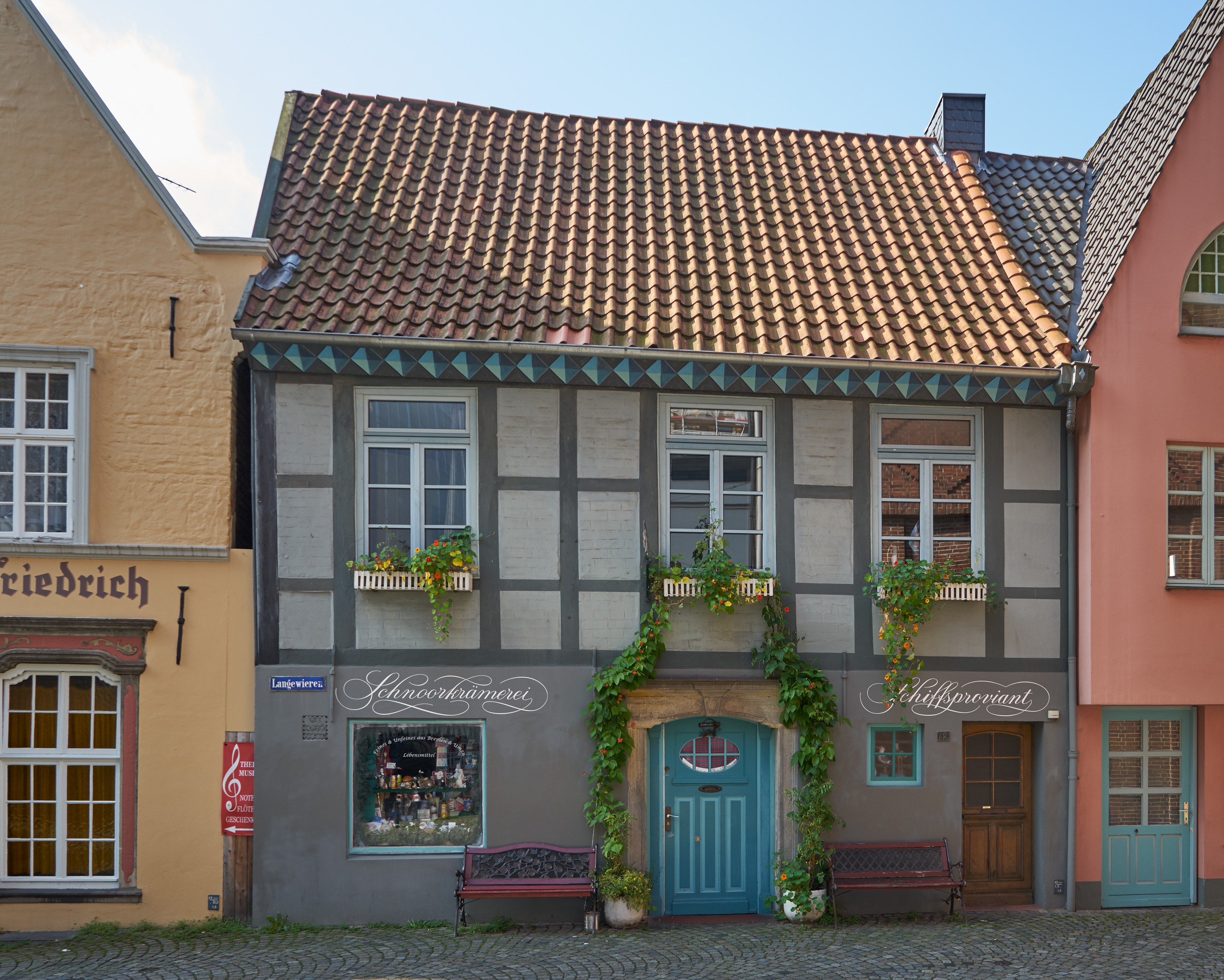 Wohnhaus in Bremen, Lange Wieren 12Das abgebildete Objekt ist ein geschütztes Kulturdenkmal in der Freien Hansestadt Bremen, mit der Nr. 1481 beim Landesamt für Denkmalpflege registriert.